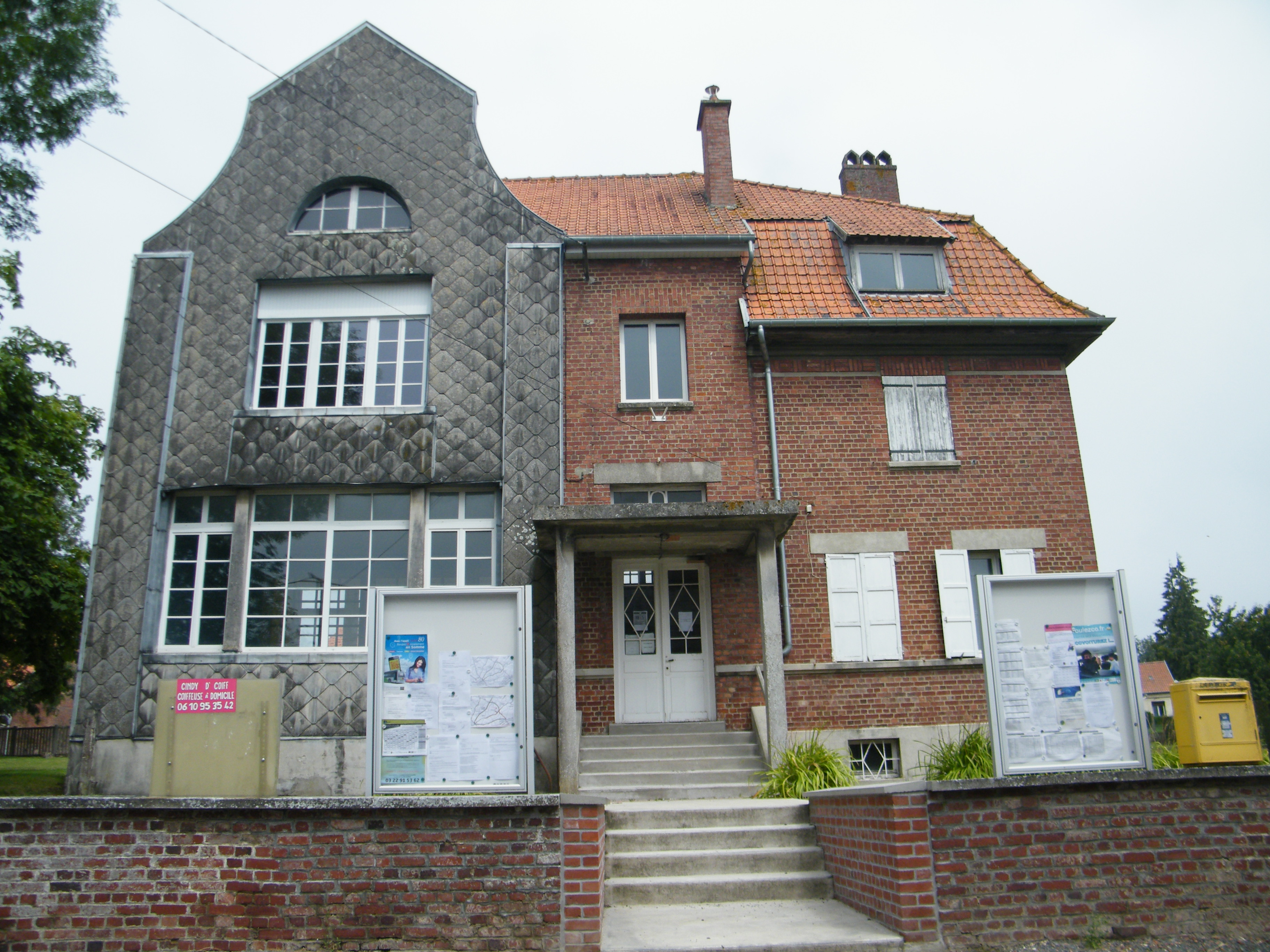 Mairie.